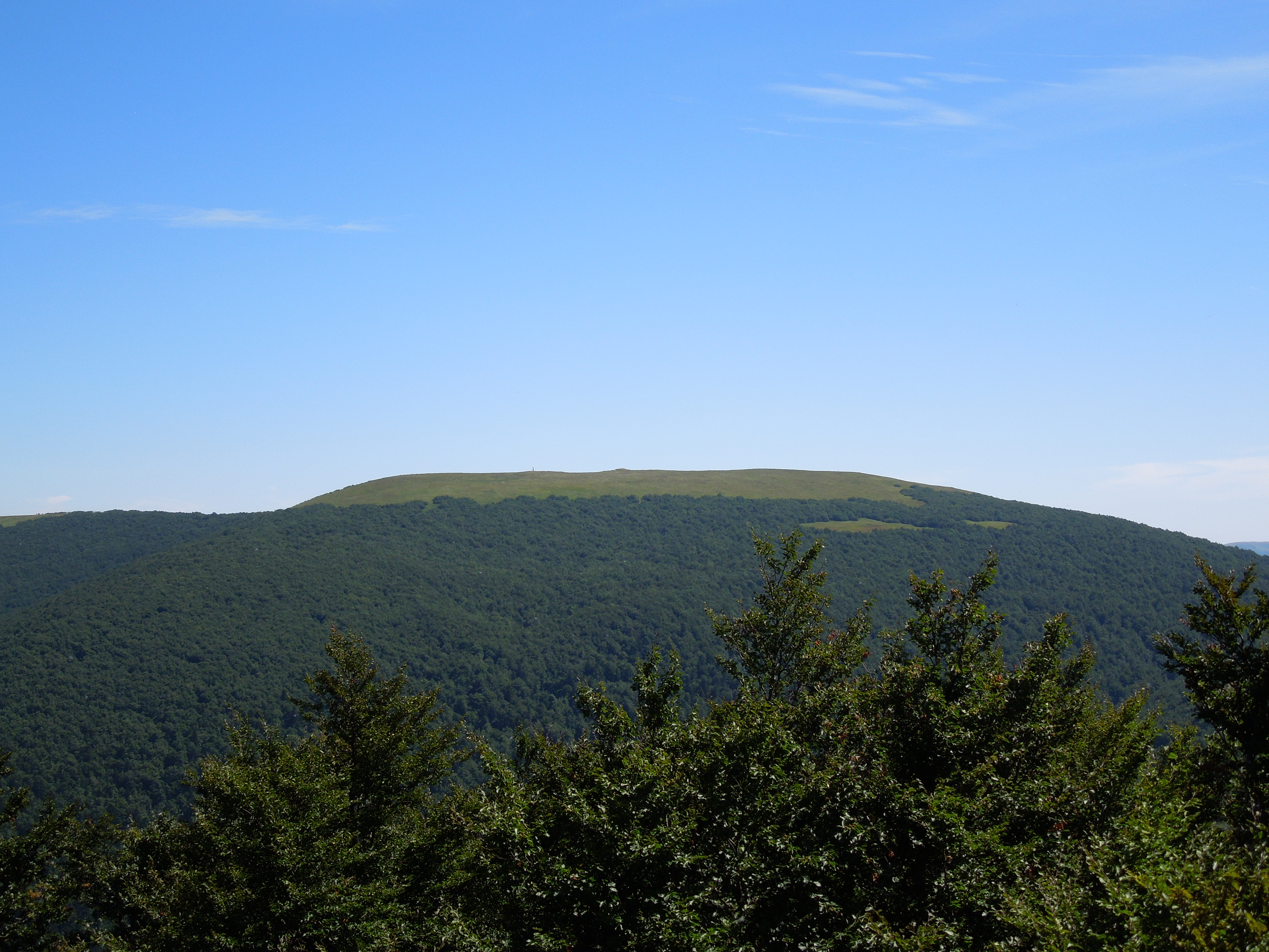 Pohľad na vrch Wielka Rawka z vrcholu Kamennej lúky začiatkom augusta